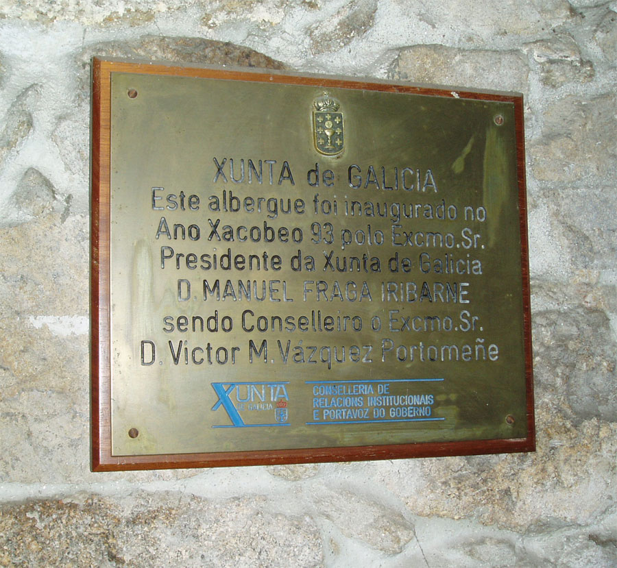 Placa en el albergue para peregrinos de Palas de Rei, provincia de Lugo, España.